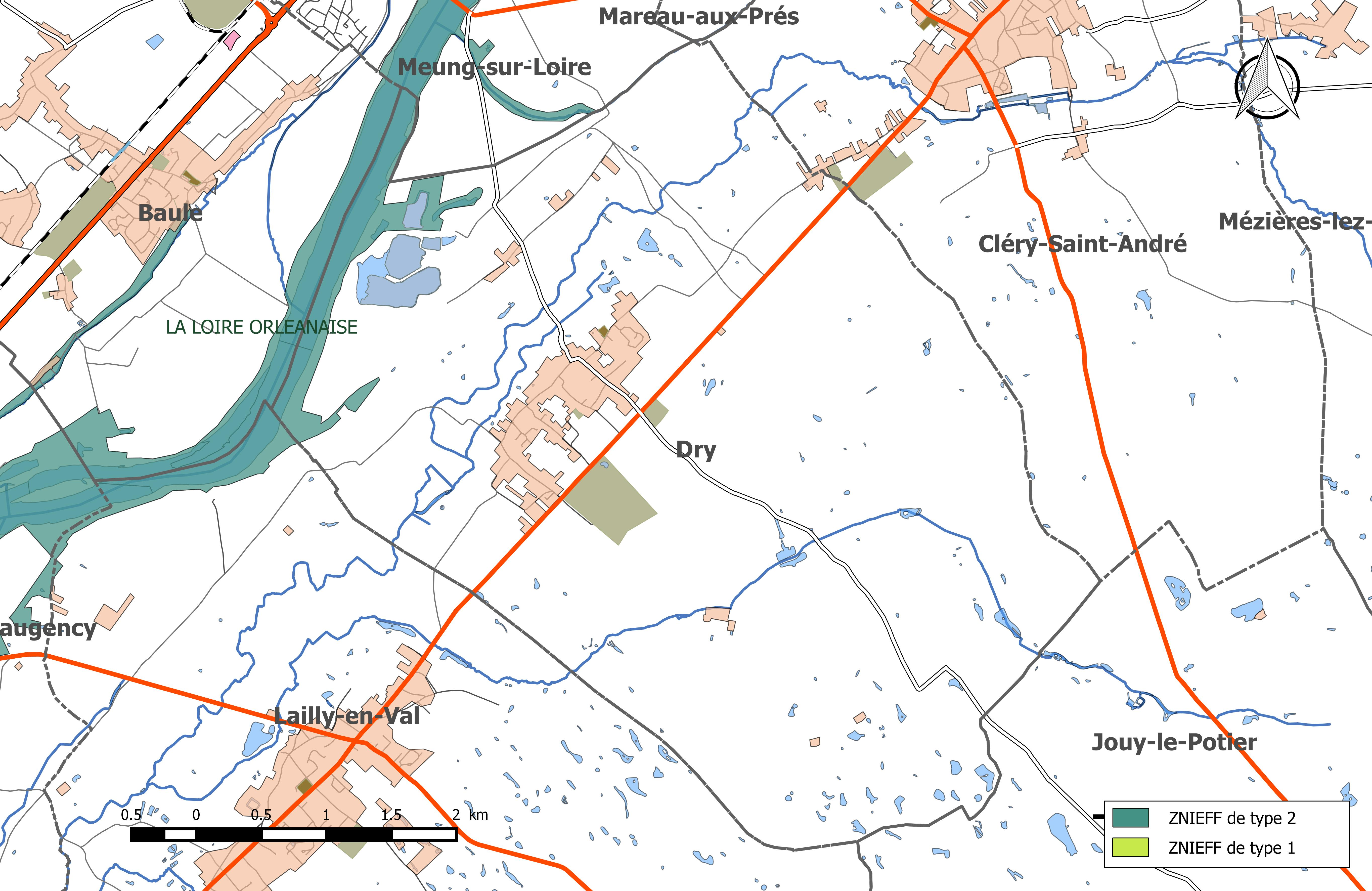 Carte des Zones naturelles d'intérêt écologique faunistique et Floristique (ZNIEFF) de la commune de Dry (Loiret).